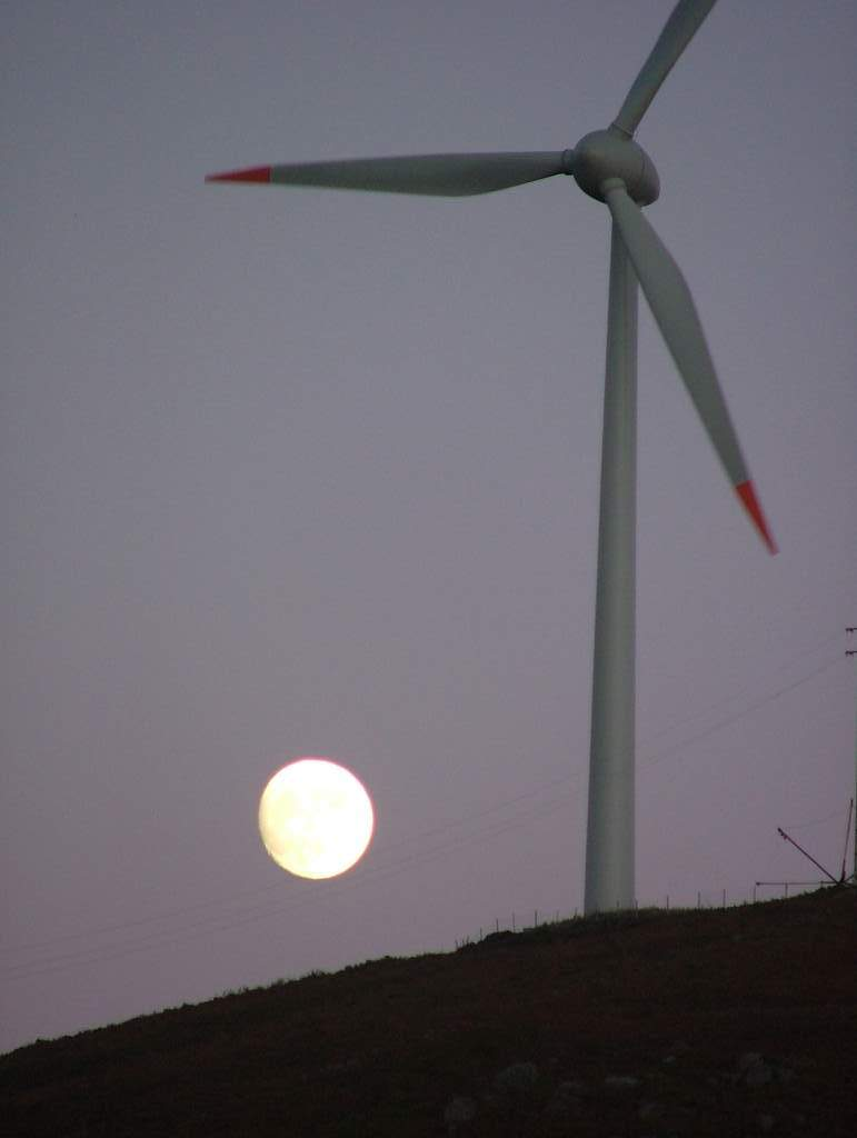 Desde 2004 que o Manique, a cujos pés está o Rogel, conta com dois geradores de energia eólicos de potências diferentes, e que durante a noite fazem-se ouvir na maior parte da aldeia.